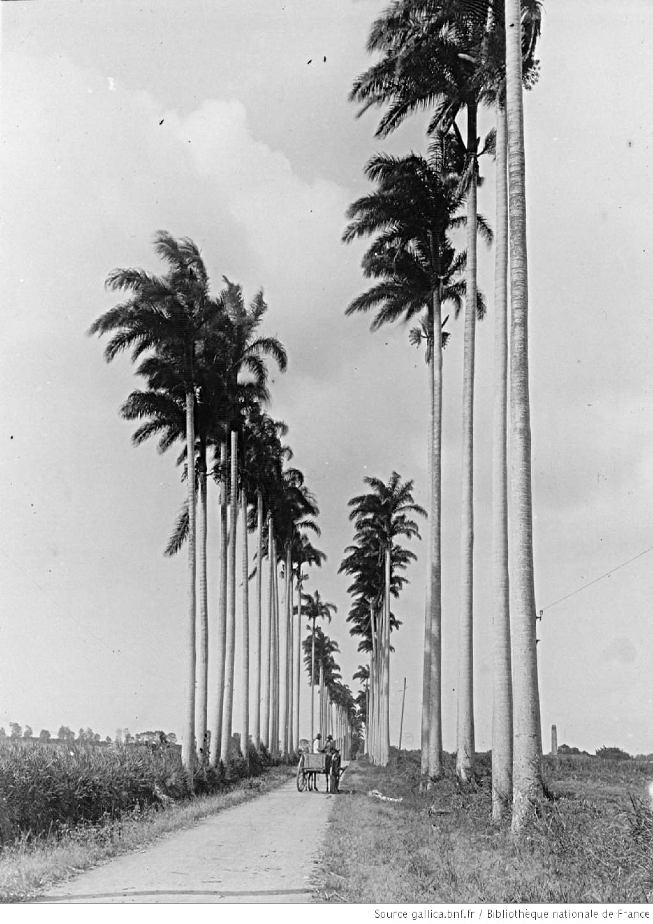 Avenue de palmistes près la Capesterre en Guadeloupe, Photographie de Salles, reproduite par Radiguet & Massiot (?), Paris, 1895. Cette allée est aussi dite "Allée Dumanoir", du nom de la famille Pinel-Dumanoir qui a créé l'allée en plantant les premiers palmiers royaux.